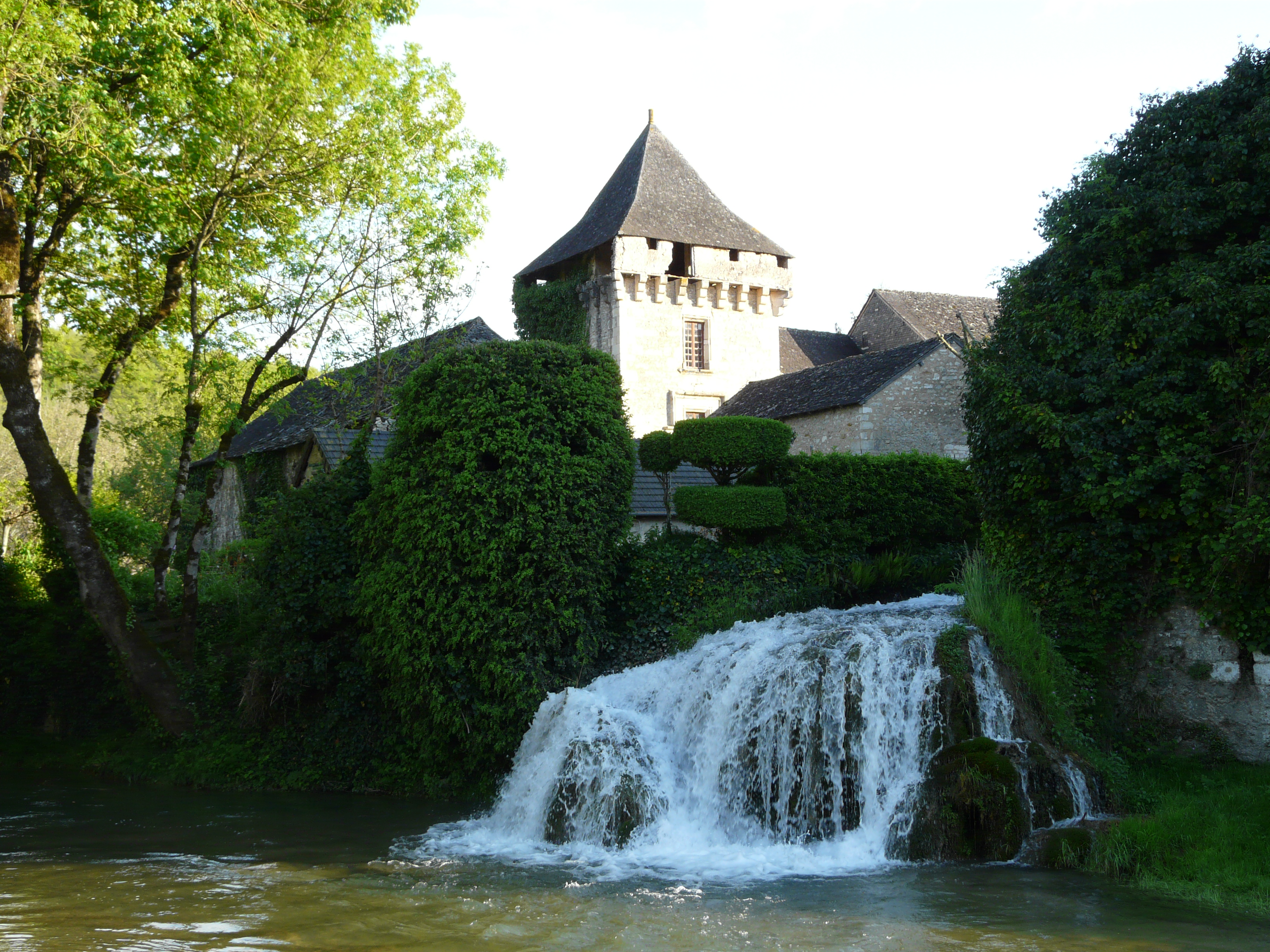 La cascade de la branche supérieure du Coly rejoignant le cours principal du Coly, 30 mètres avant sa confluence avec la Vézère, Condat-sur-Vézère, Dordogne, France. Au second plan, le donjon du château de Condat Object location45° 07′ 01″ N, 1° 13′ 44″ E